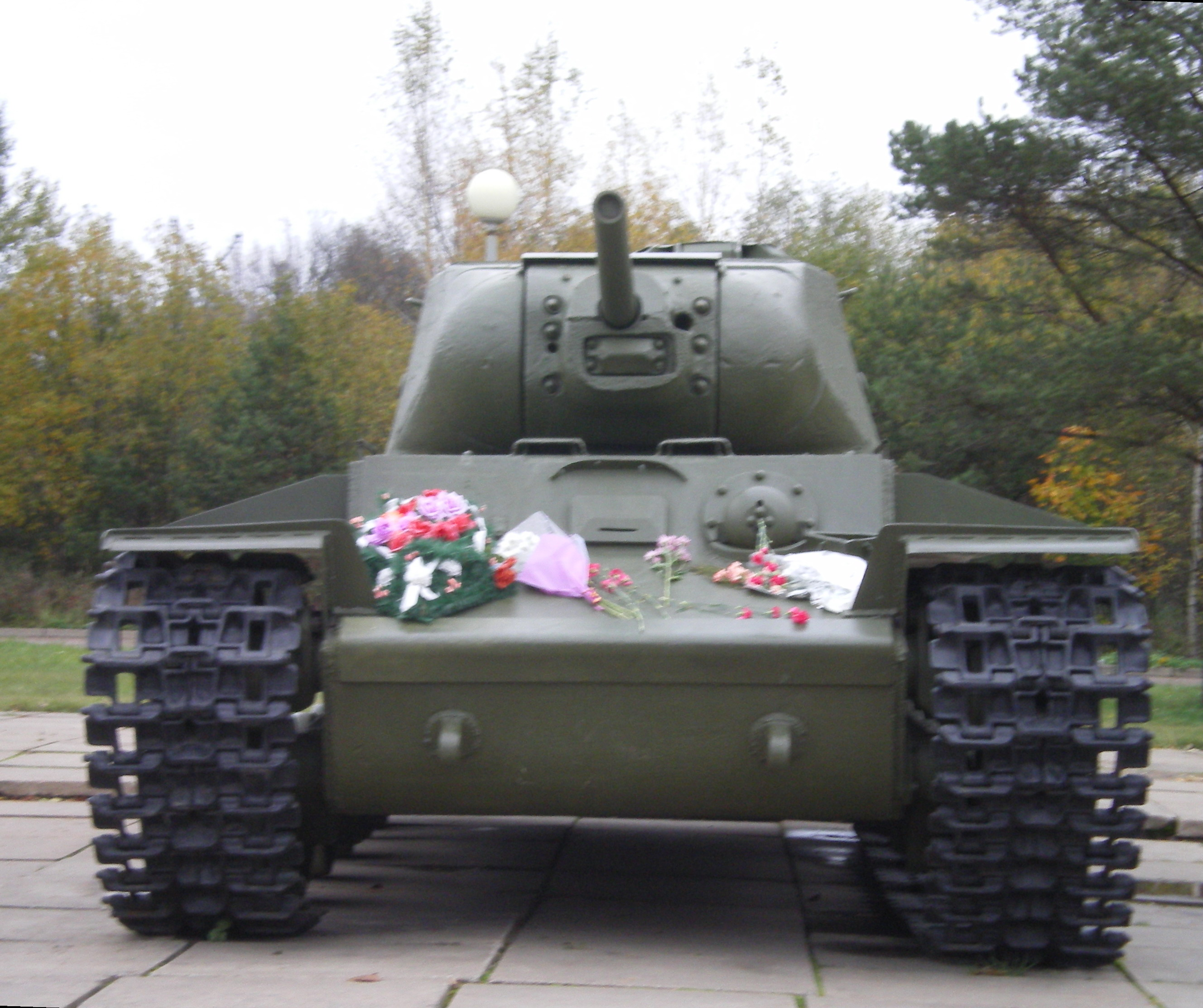 Танк КВ-1. Вид спереди. Диорама «Прорыв блокады Ленинграда». Экспозиция военной техники периода 1941–1944 годов под открытым небом.